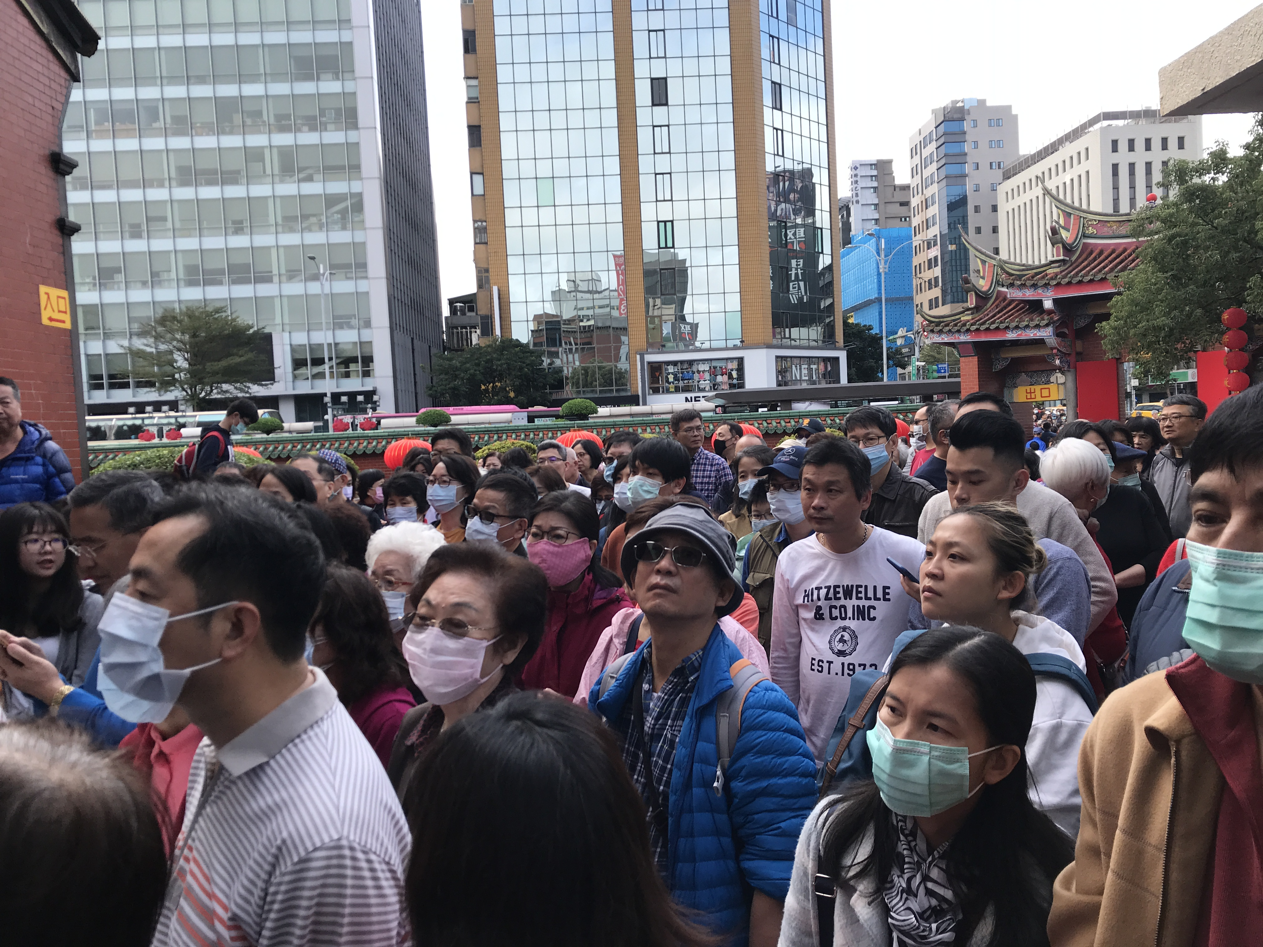 中文（台灣）: 2020年1月25日上午，庚子年大年初一參拜行天宮。時逢新型冠狀病毒肺炎大流行，多數人均戴口罩。